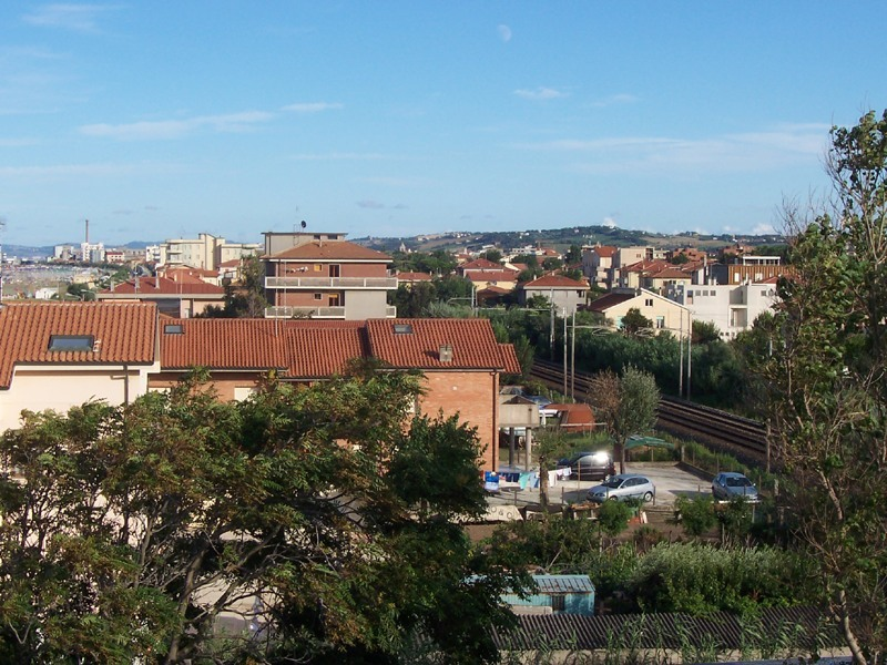 Senigallia